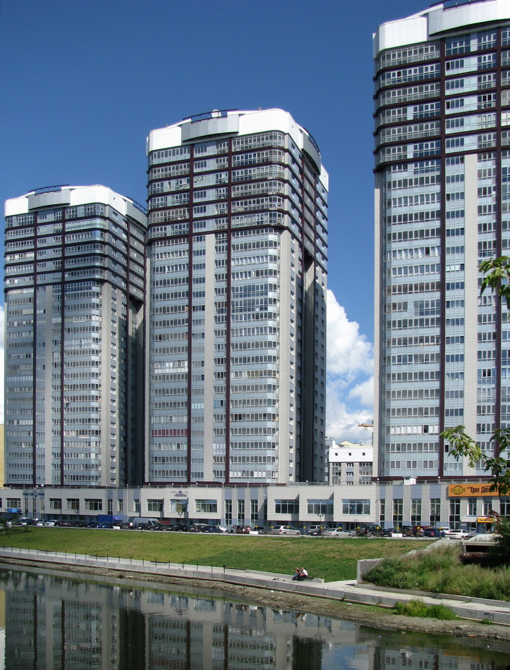 Строящийся жилой комплекс в Екатеринбурге